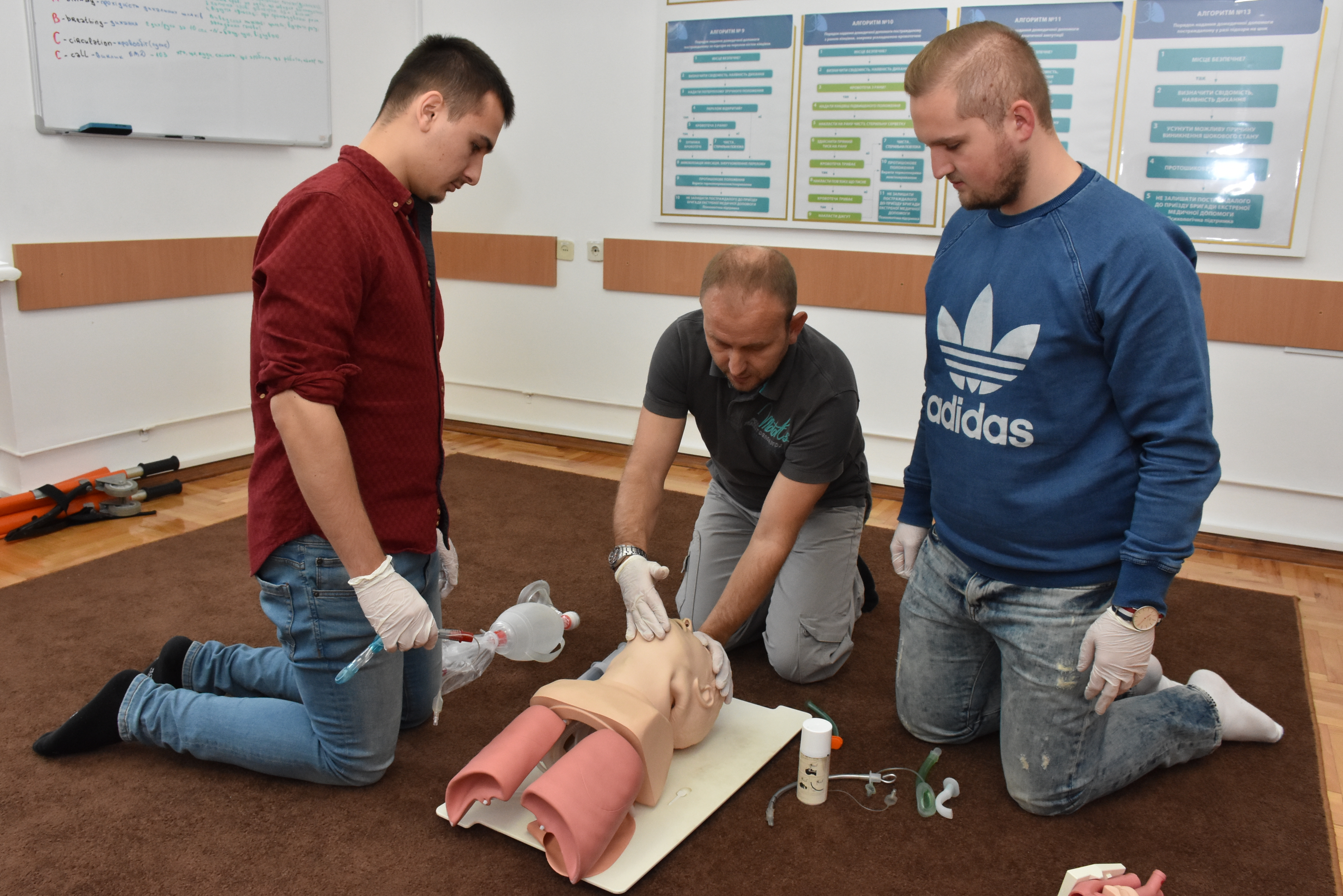 Студенти на заняттях у центрі симуляційного навчання Тернопільського державного медичного університету імені І. Я. Горбачевського.